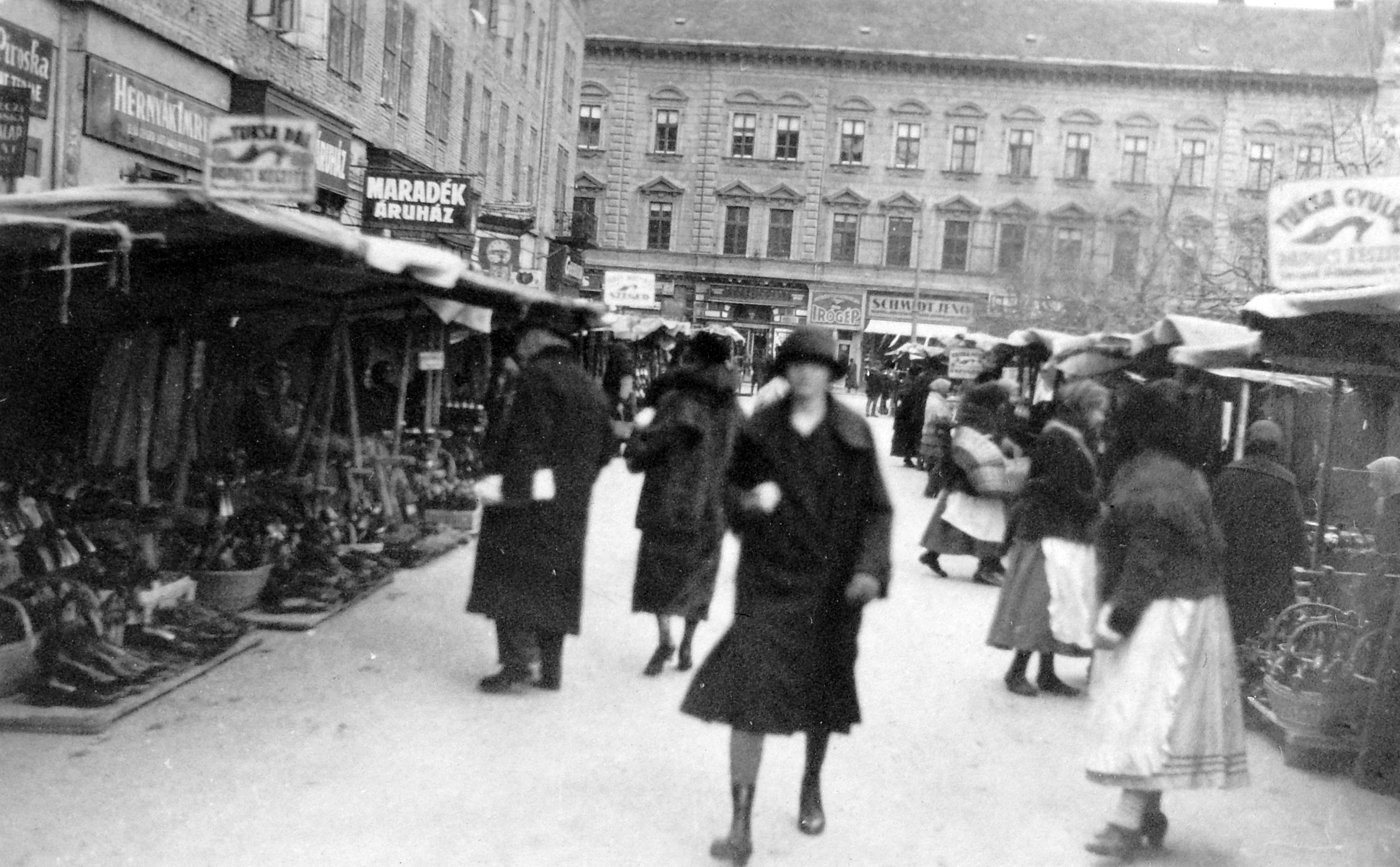 Széchenyi tér, a Zsótér-ház előtti szélesebb járda. Szemben a Kossuth Lajos sugárút torkolata. Location: Hungary, Szeged Title: Széchenyi tér, a Zsótér-ház előtti szélesebb járda. Szemben a Kossuth Lajos sugárút torkolata.